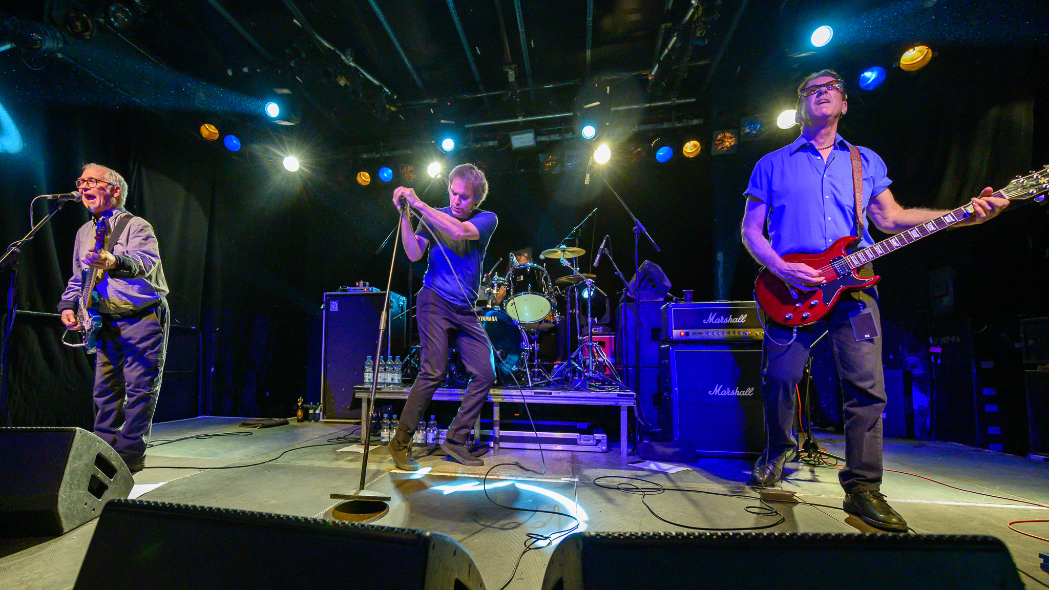 Concertbüro Franken,Dead Kennedys,Der Hirsch,East Bay Ray,Geoffrey Lyall,Klaus Flouride,Konzert,Livekonzert,Livemusik,Raymond John Pepperell,Ron "Skip" Greer